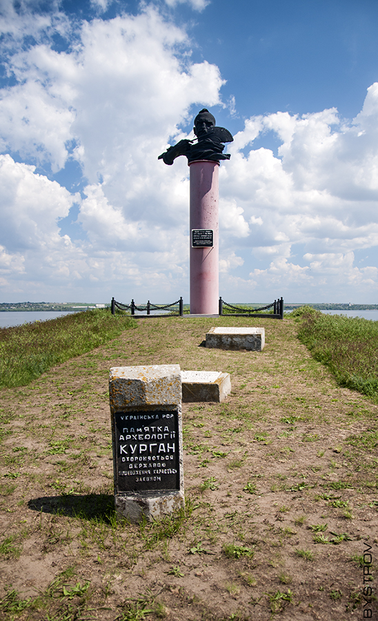 Каменская Сечь, Курган